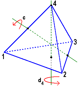 Veranschaulichung der Drehungen des Tetraeders